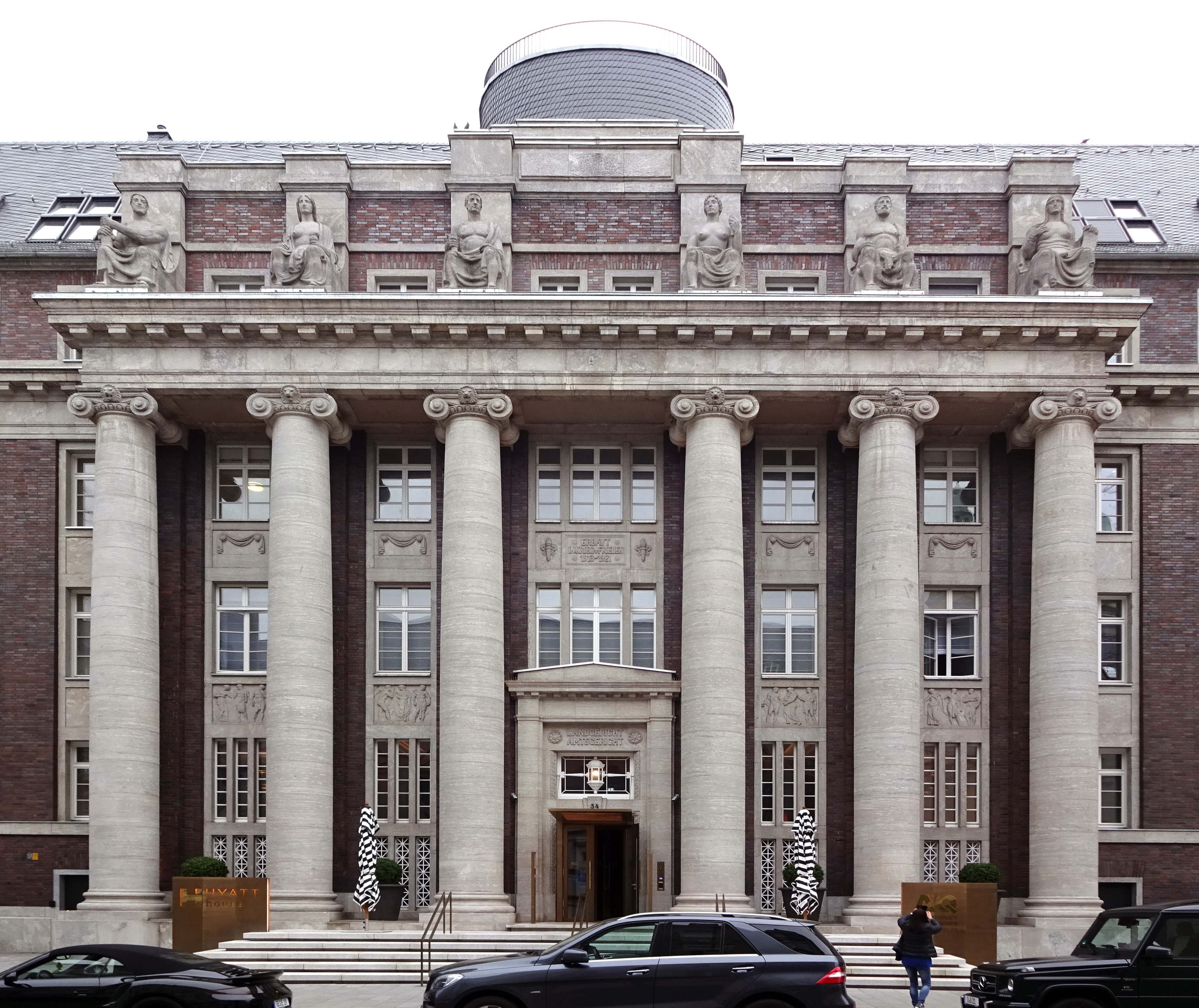 Ehemaliges Amtsgericht, Portal Mühlenstraße 34, Hyatt House Andreas Quartier, Düsseldorf-Altstadt. Über dem Portikus sind als Sitzbilder überlebensgroße Personifikationen der Tugenden von dem Bildhauer Hubert Netzer zu sehen.